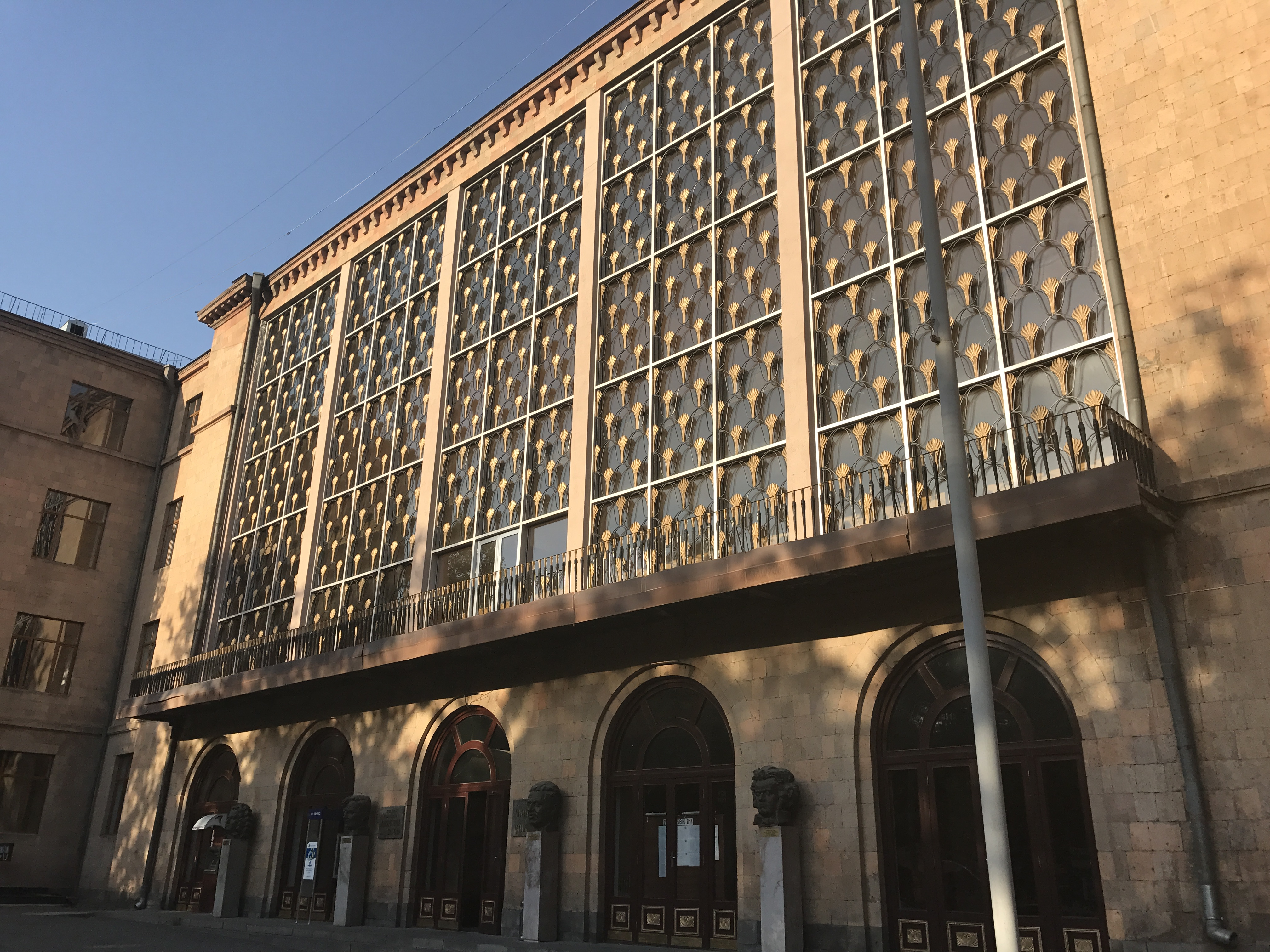 Image d'Erevan en juillet 2017. Sujet divers.